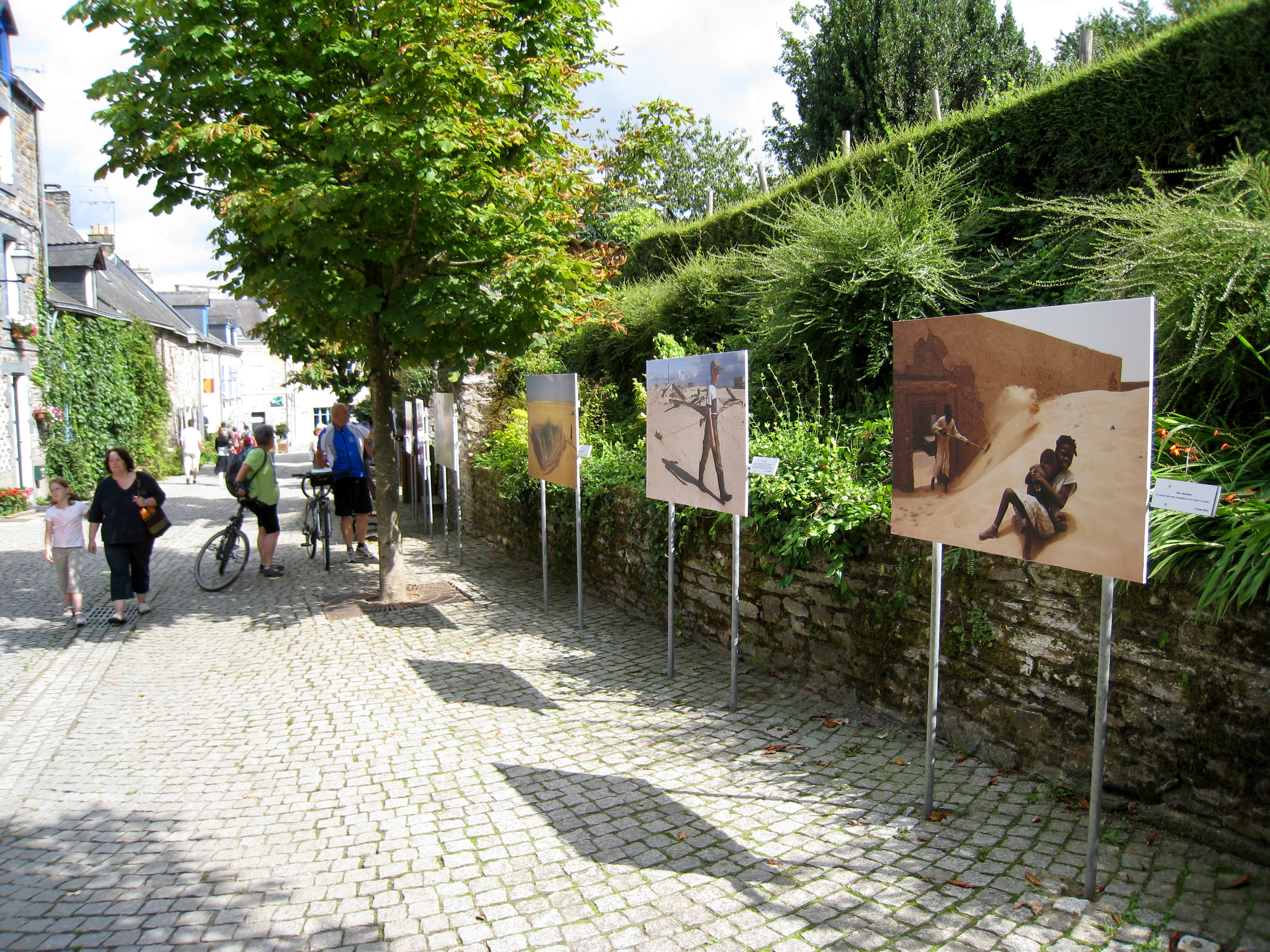 Rue Saint Vincent, La Gacilly, où se déroule une exposition photo en plein air dans le cadre du Festival photo organisé chaque année depuis 2003.